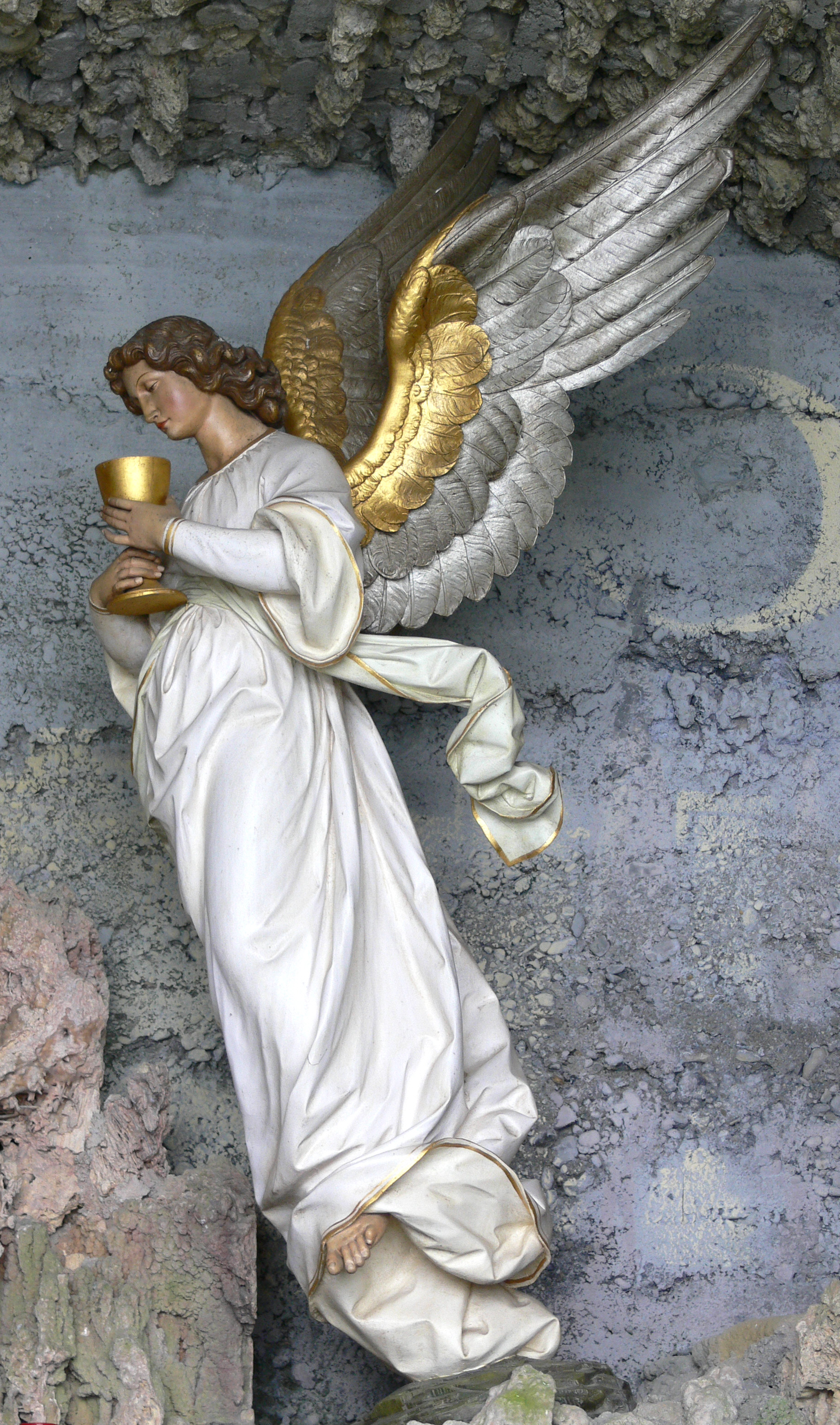 Horgenzell, Andachtsstätte „Föhrenbühl“ in Wolketsweiler: Ölberg Skulpturen von Moriz Schlachter